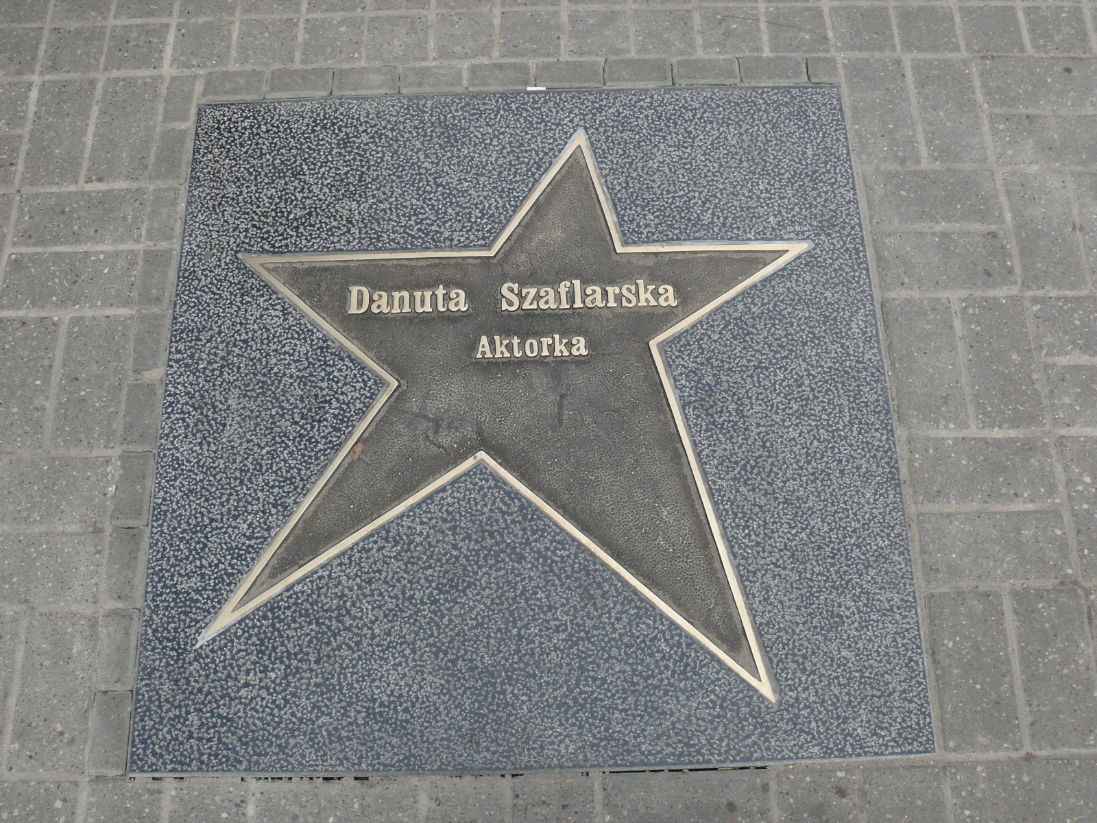 Łódź Walk of Fame - Danuta Szaflarska